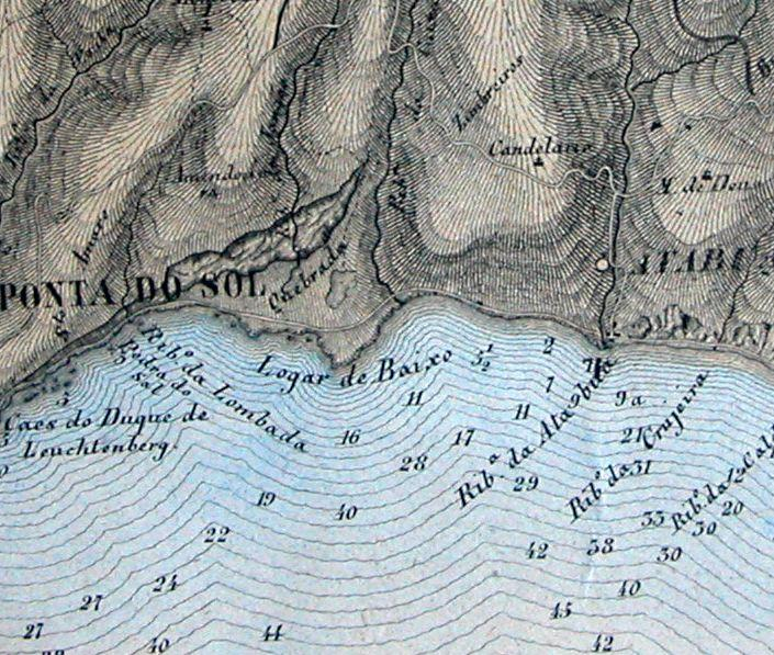 Logar de Baixo. Pormenor da Carta Geo-Hydrographica da Ilha da Madeira. 1879. Folha 2, de 3 folhas, 95 x 74 cm. Escala de 1: 36450 ou “6 polegadas por ligne de 20 ao grau ou 2 polegadas por milha geográfica igual a 1852 m”; escala gáfica de 3 milhas = 14,9 cm. E 6 Km = 16,4 cm. Impresso aguarelado, J. F. M. Palha gr.. António Pedro de Azevedo, 1879. Arquivo e biblioteca de Rui Carita em depósito no Arquivo Regional da Madeira. Carta Geo-Hydrographica da Ilha da Madeira e dos Ilheos e Baixos adjacentes. Levantada collectivamente em 1842-43 pelos officiaes do vapor de guerra britânico Styx e o capitão do Corpo de Engenheiros António Pedro de Azevedo, hoje general de Divisão reformado por Decreto de 12/12/1878. Correcta e publicada com várias ampliações em 1879, fazendo parte da collecção de Cartas, Mappas, Vistas e memórias appresentadas por este official ao Commando e Direcção Geral de Engenharia e Ministério da Guerra. 1879.